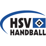 Logo da equipe alemã de handebol HSV Hamburg